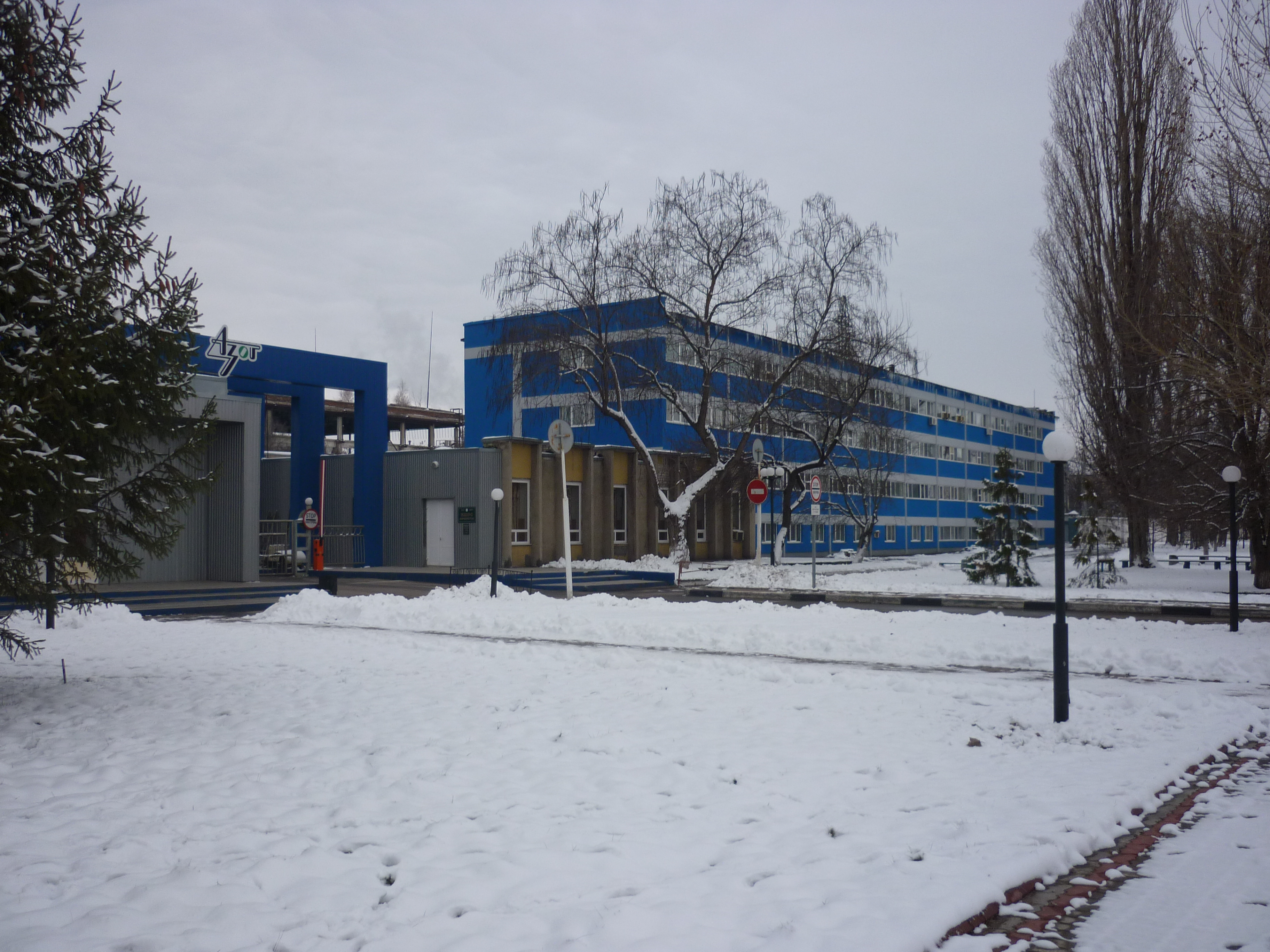 ВАТ "Азот" в місті Черкаси (прохідна)